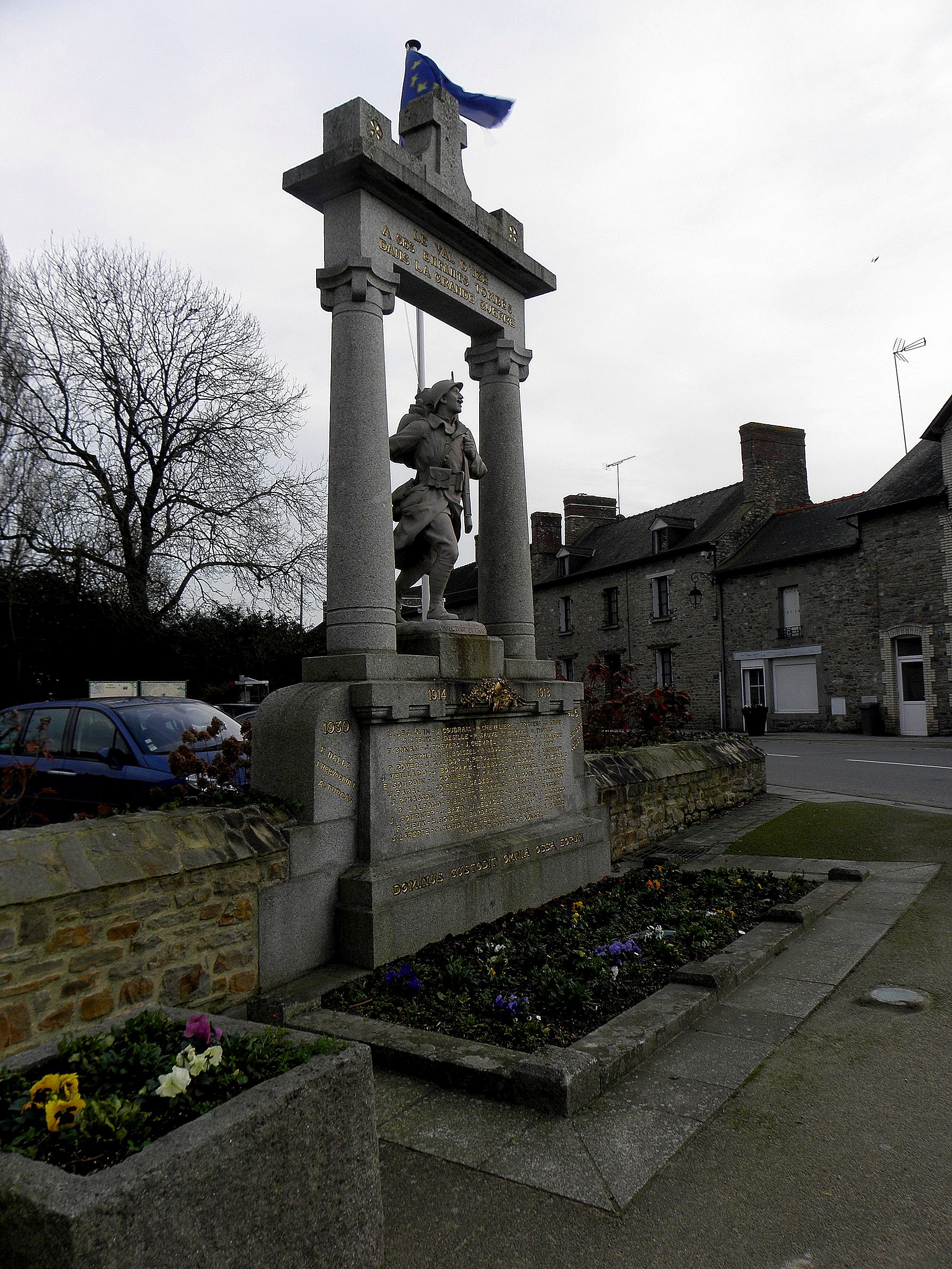 Monument aux morts du Val-d'Izé (35).